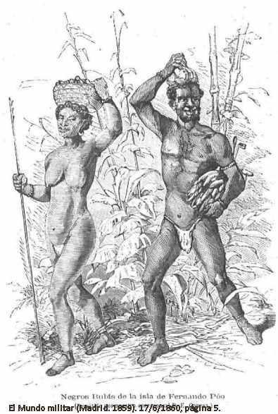 Indigeni di etnia Bubi nell'isola di Fernando Po